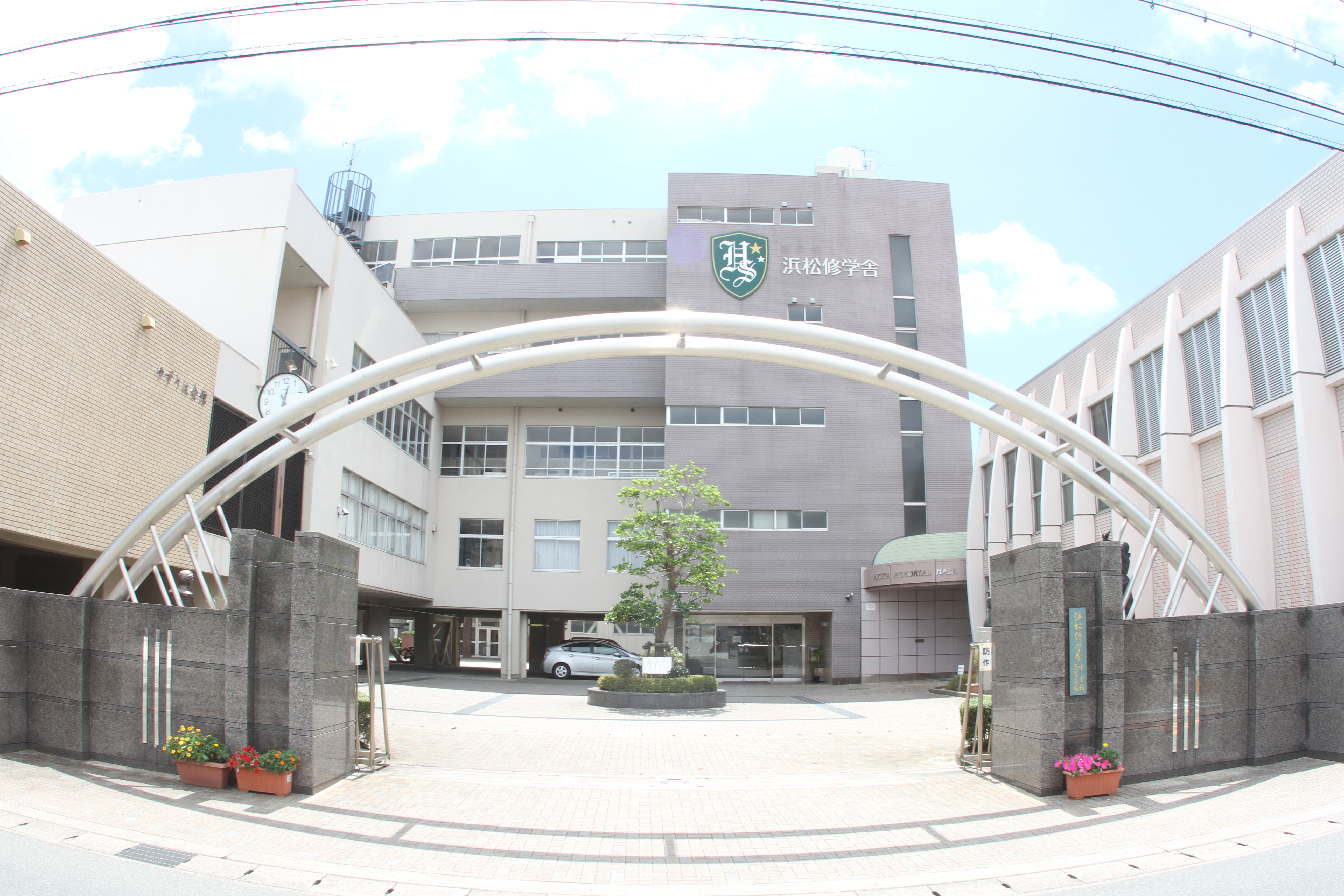 浜松修学舎中学校・高等学校